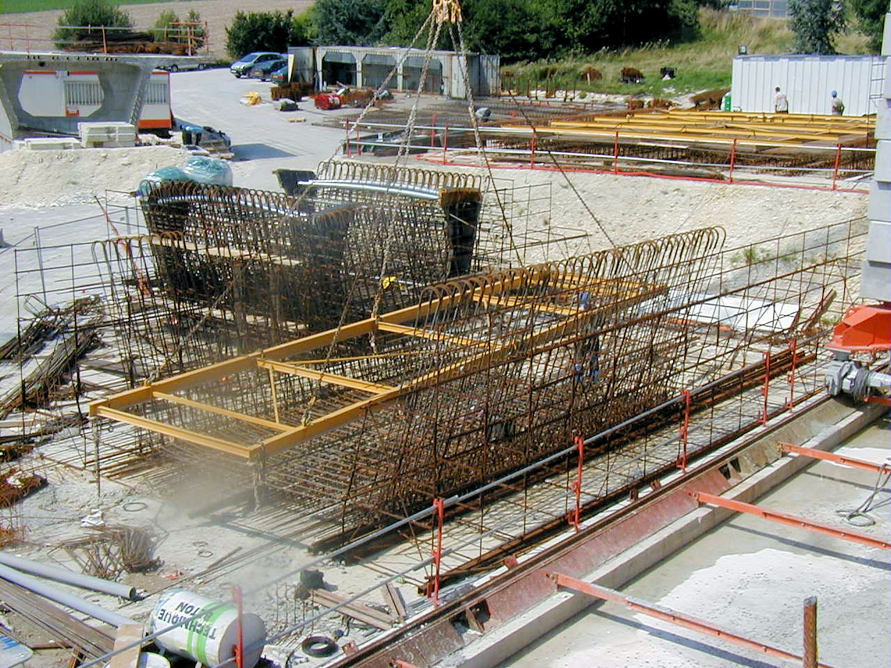 Construction du doublement du viaduc Jules-Verne - Palonnier de transfert des cages d'armatures du tablier